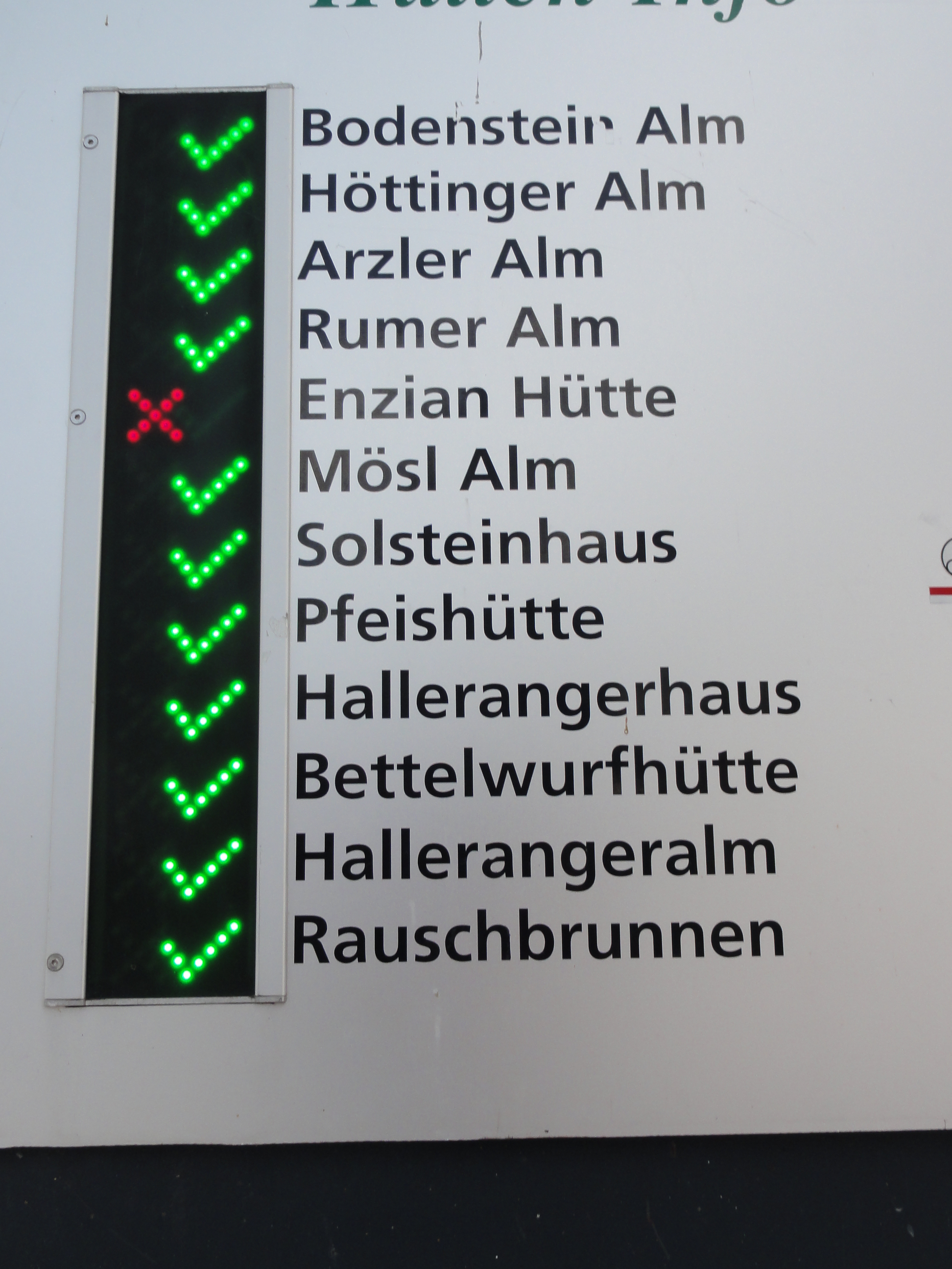 Innsbruck